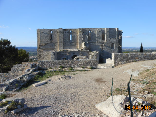 Abbaye de Saint-Félix-de-Montceaux, massif de la Gardiole, dominant Gigean (Hérault).